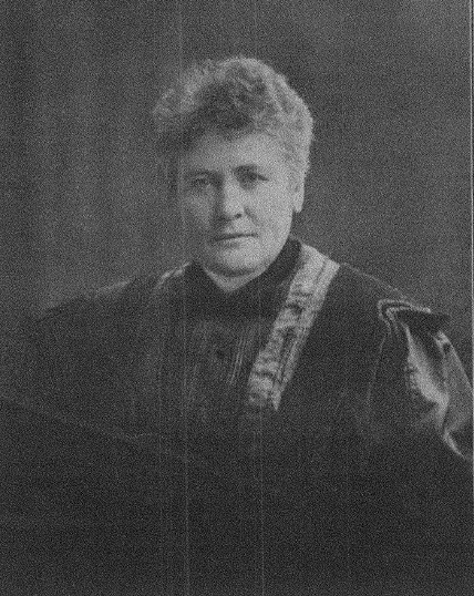 Illustration till artikel i tidskriften Dagny om Stina Quint i samband med hennes 50 årsdag.